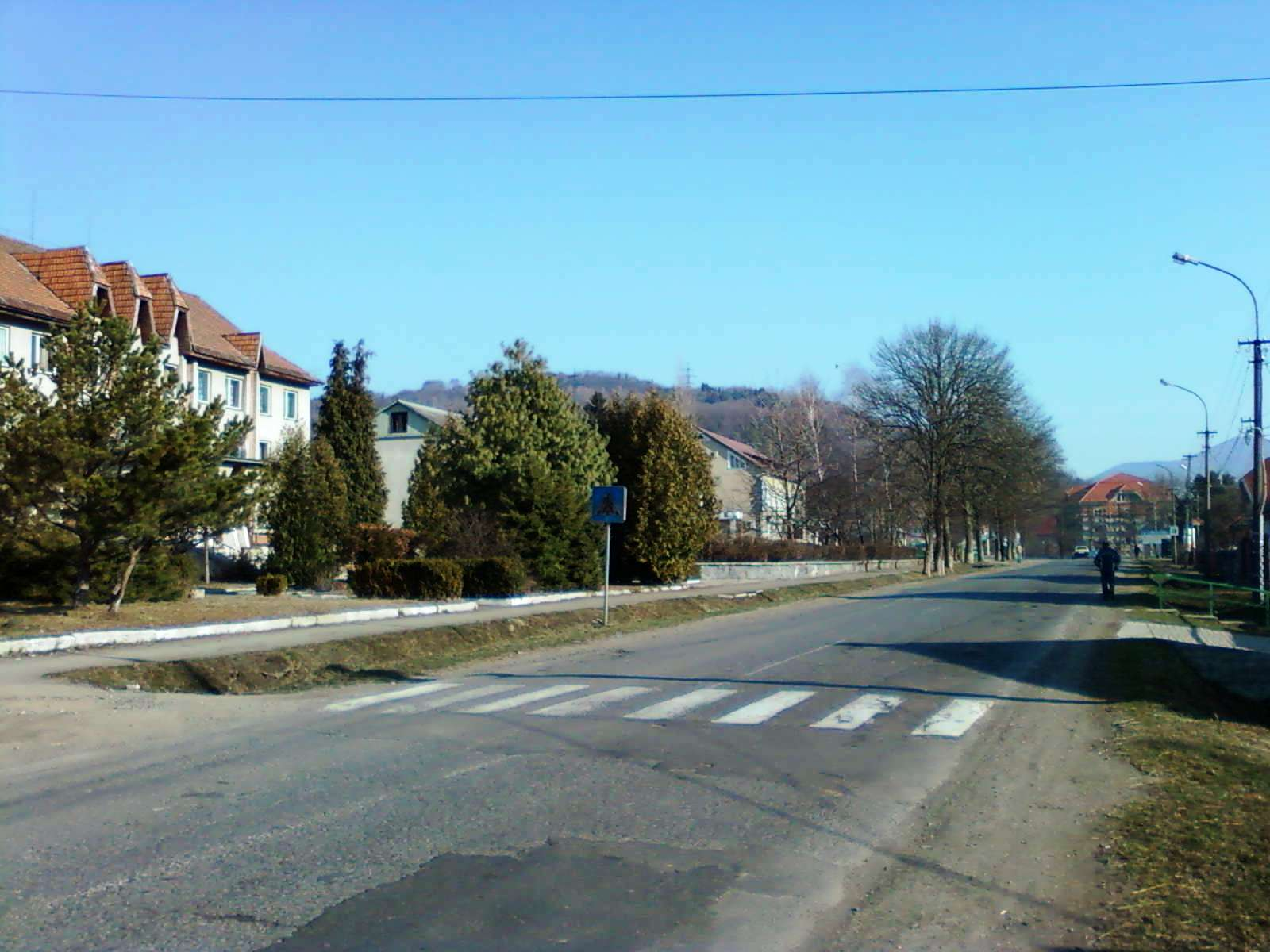 Село Поляна (Свалявский район Закарпатской области Украины)